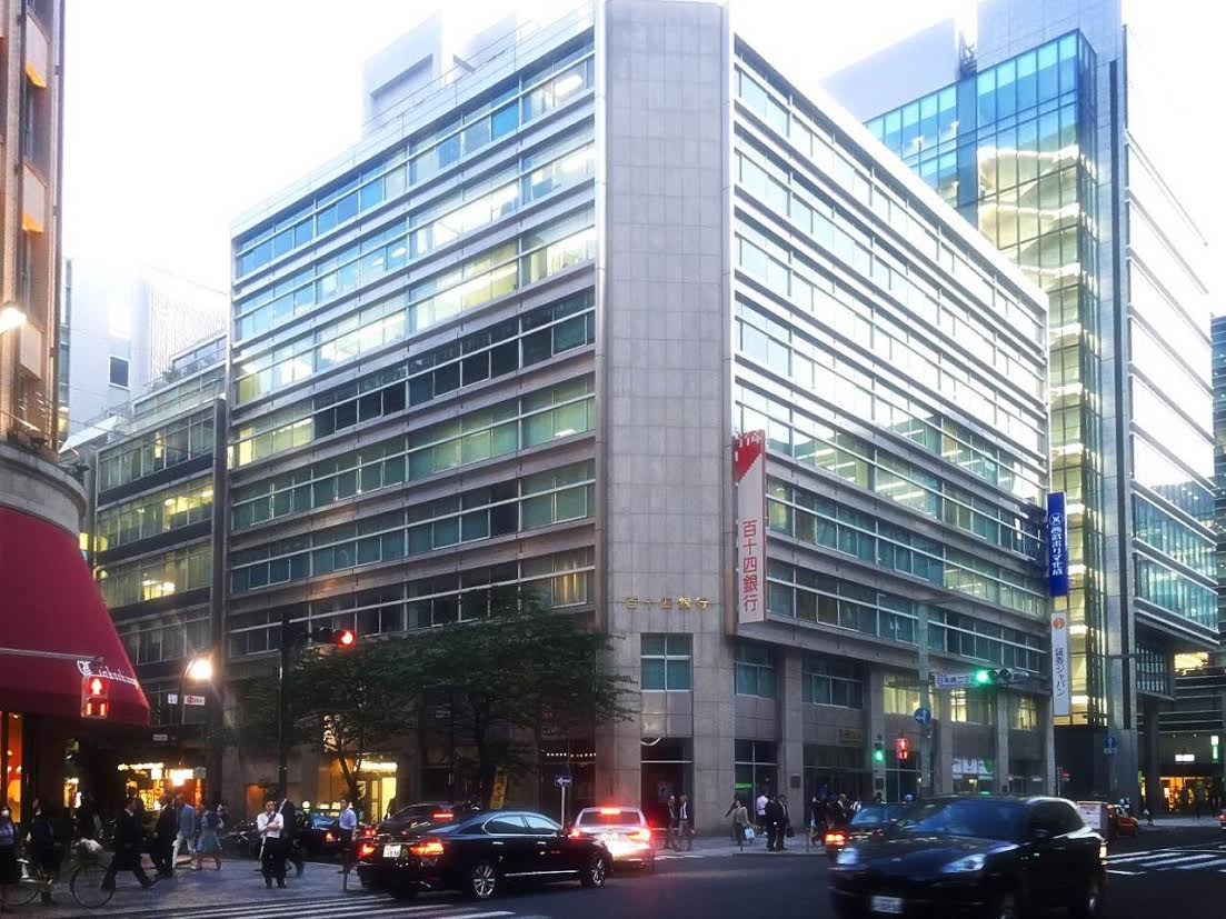 百十四銀行の東京支店